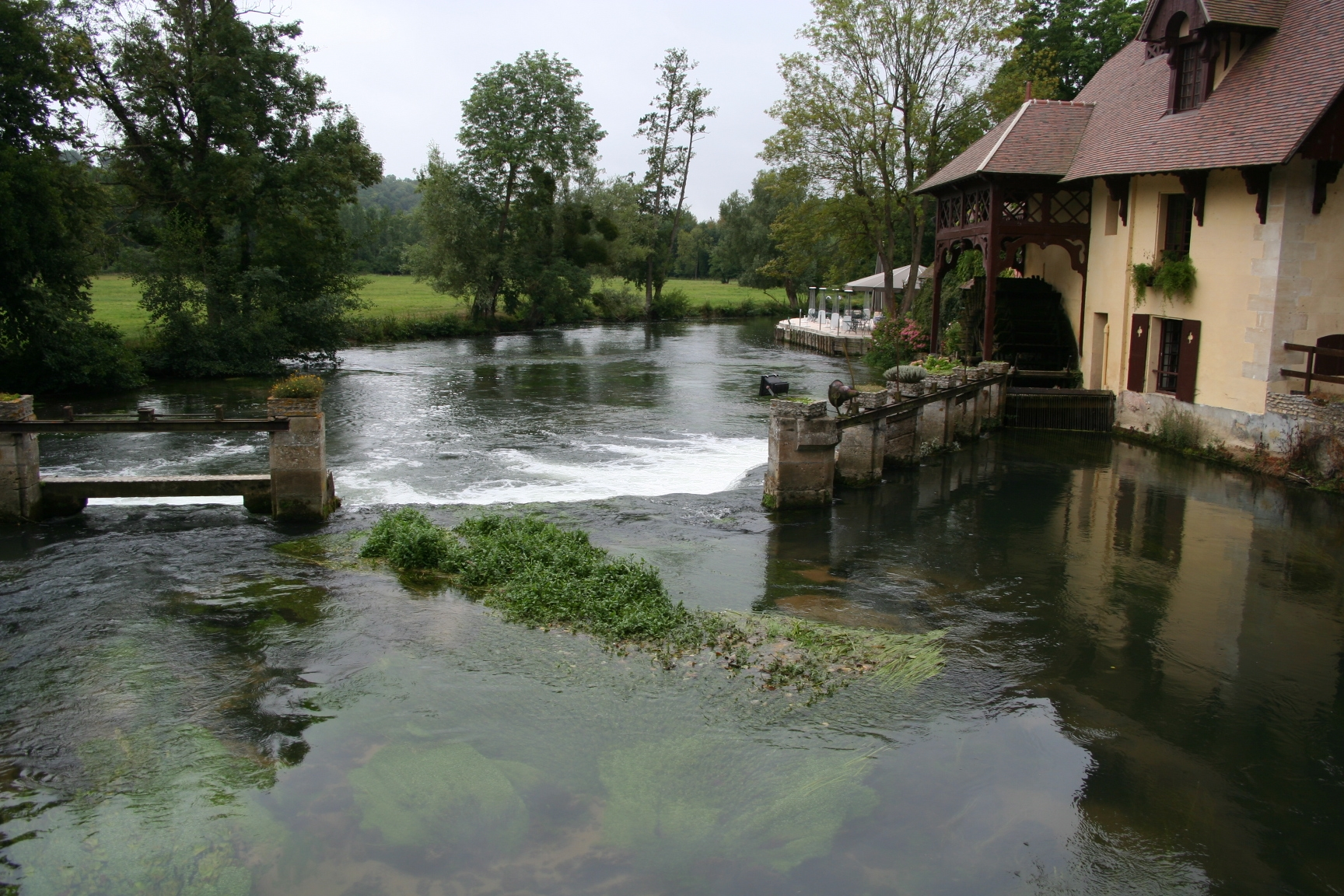 L'Epte au moulin de Fourges - (limite entre les départements de l'Eure: région Normandie et le Val-d'Oise: région Île-de-France